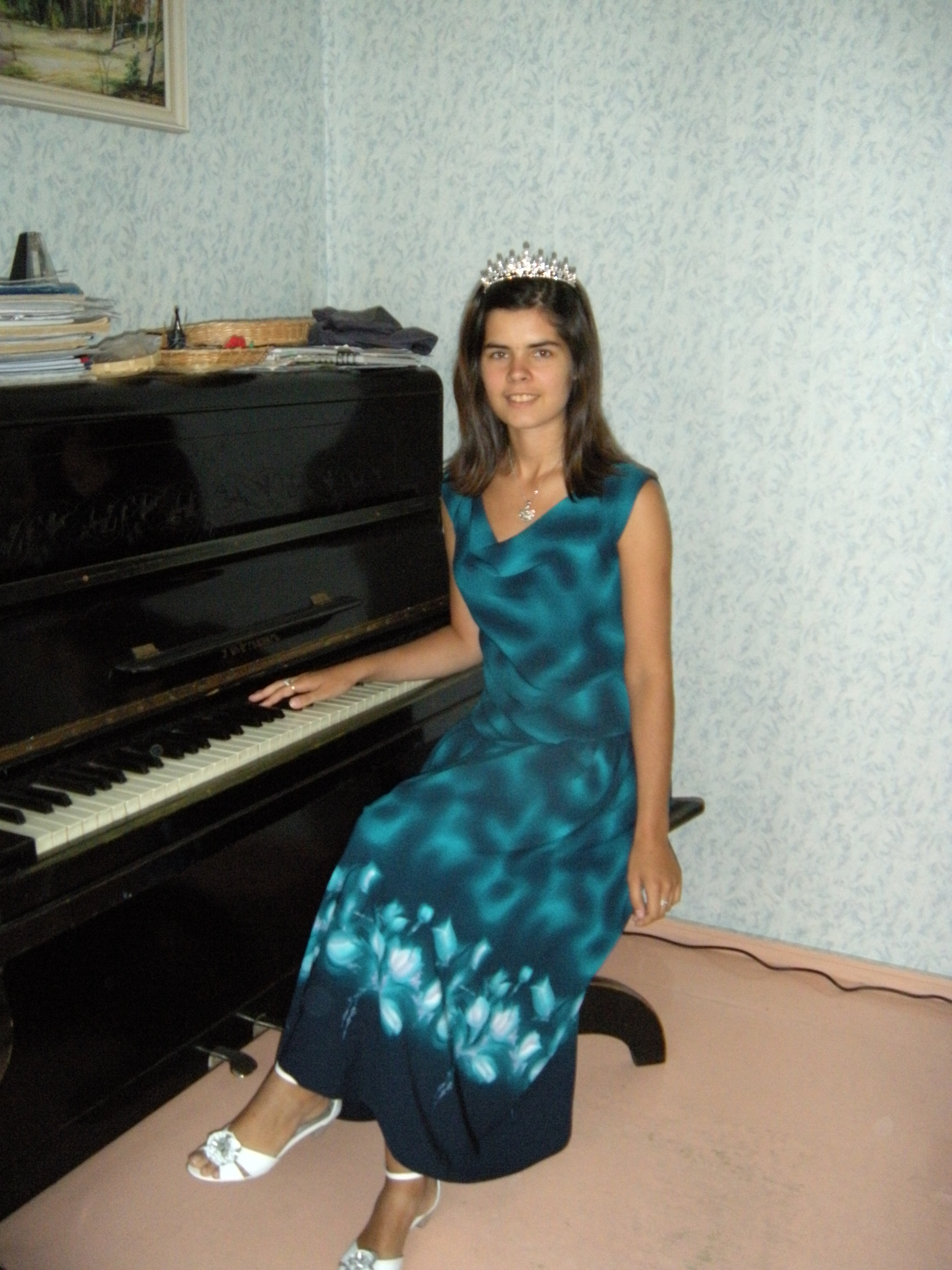 Diana Aitai